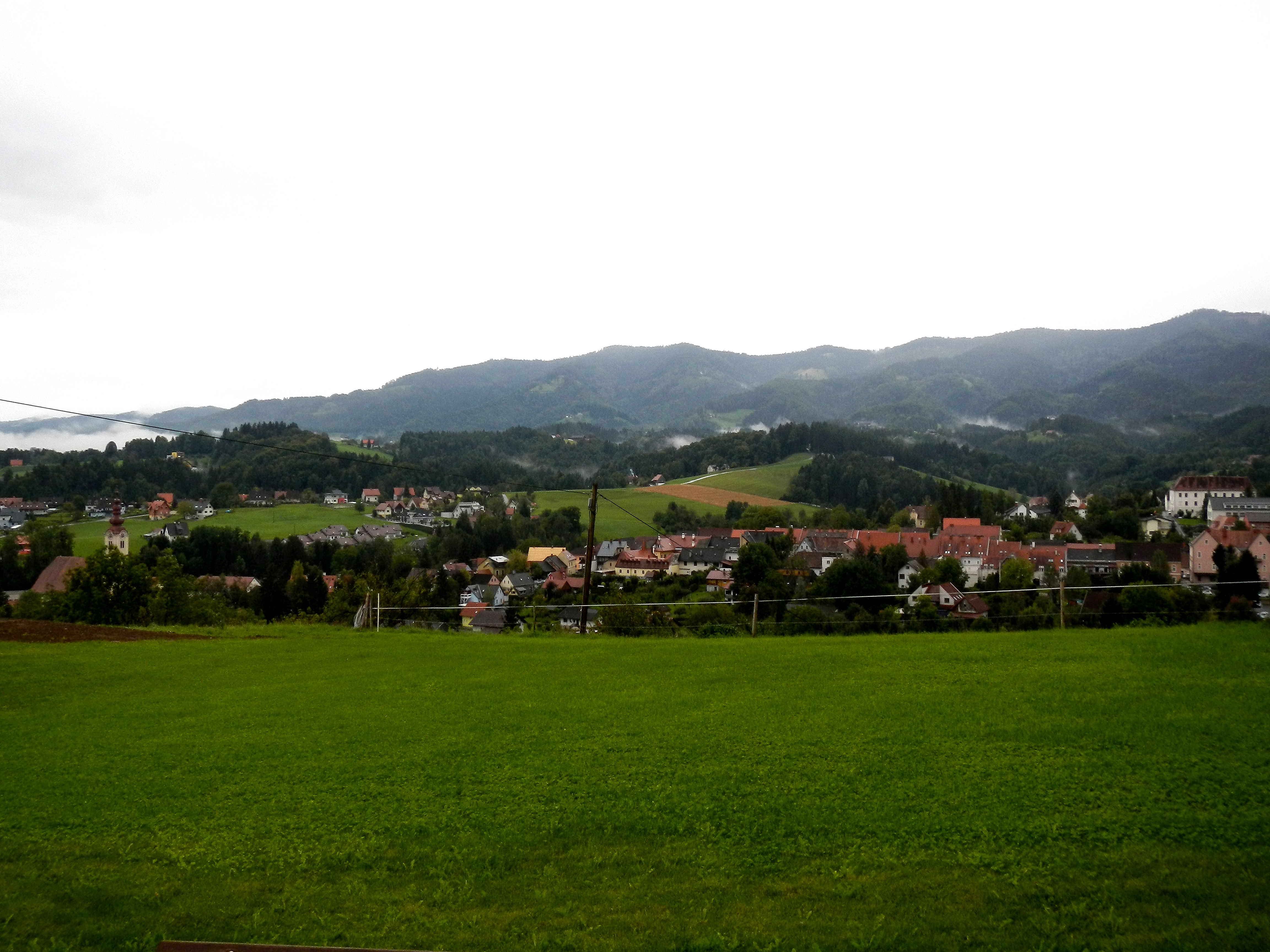 Gebiet des Aichberg-Hofes nördlich von Eibiswald, Steiermark, Österreich